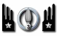 Mostrine e fregio di Savoia Cavalleria